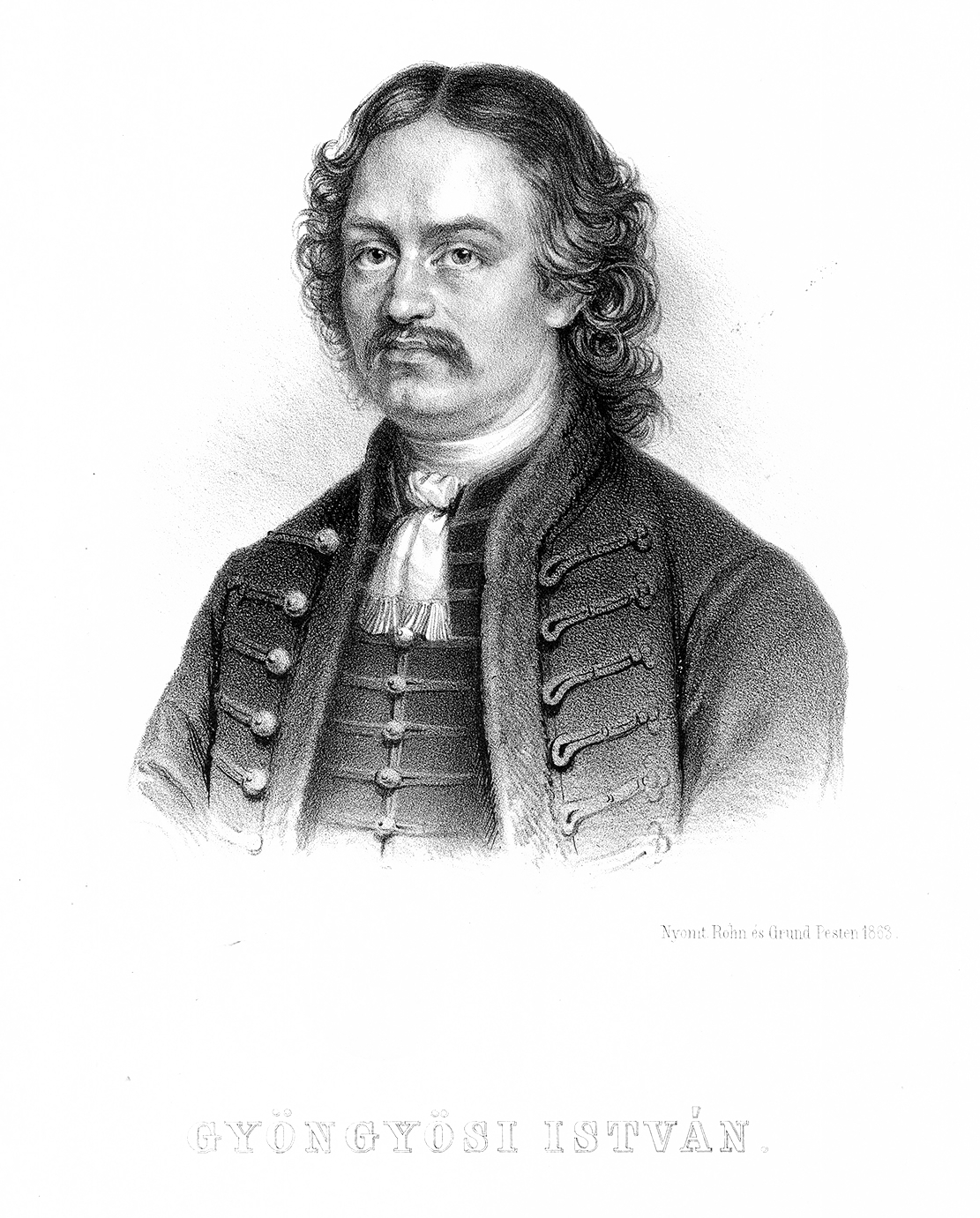 Gyöngyösi István (Radvánc, 1629. augusztus 25. – Csetnek, 1704. július 24.) magyar költő, alispán, országgyűlési követ.